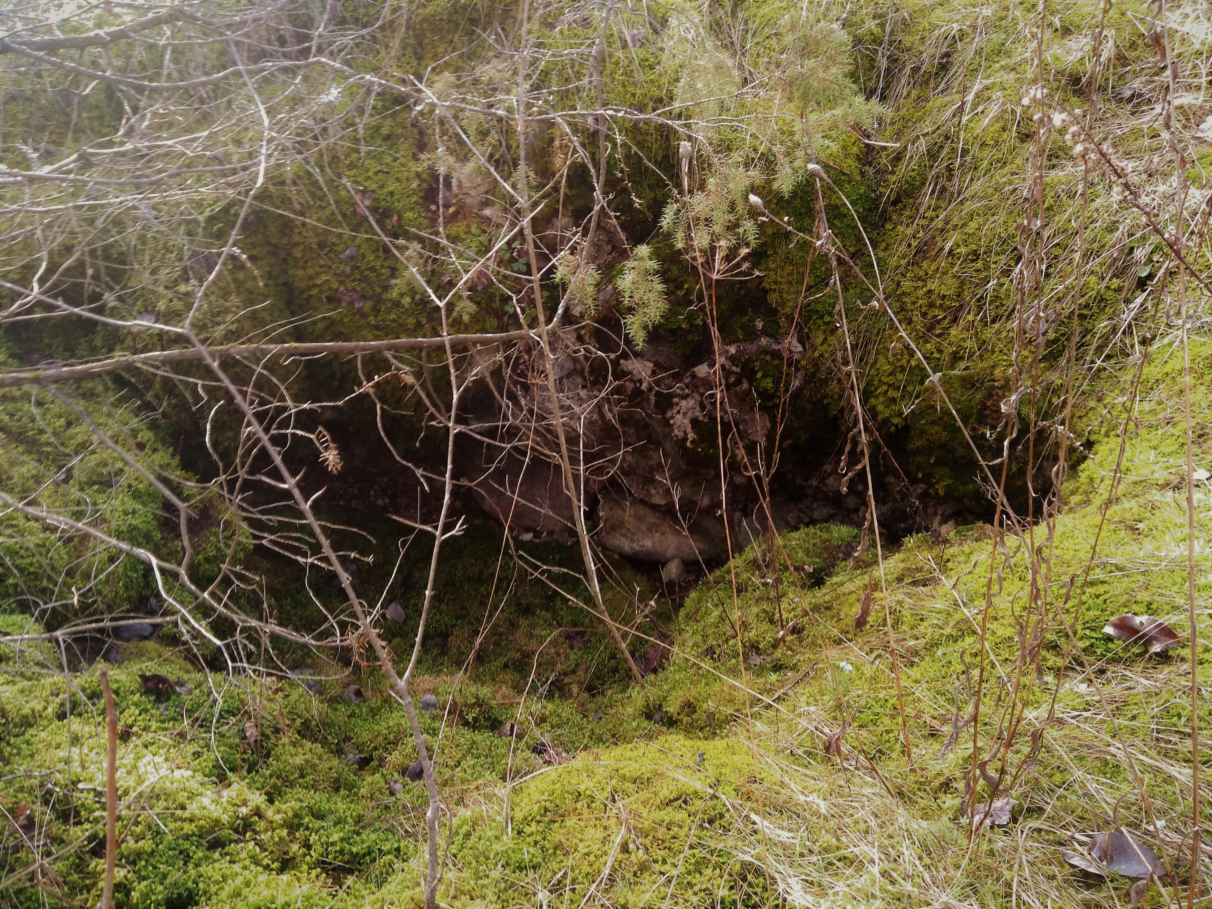 Vaade ida suunast linnuse kagukülje sisehoovi vundamentidele.